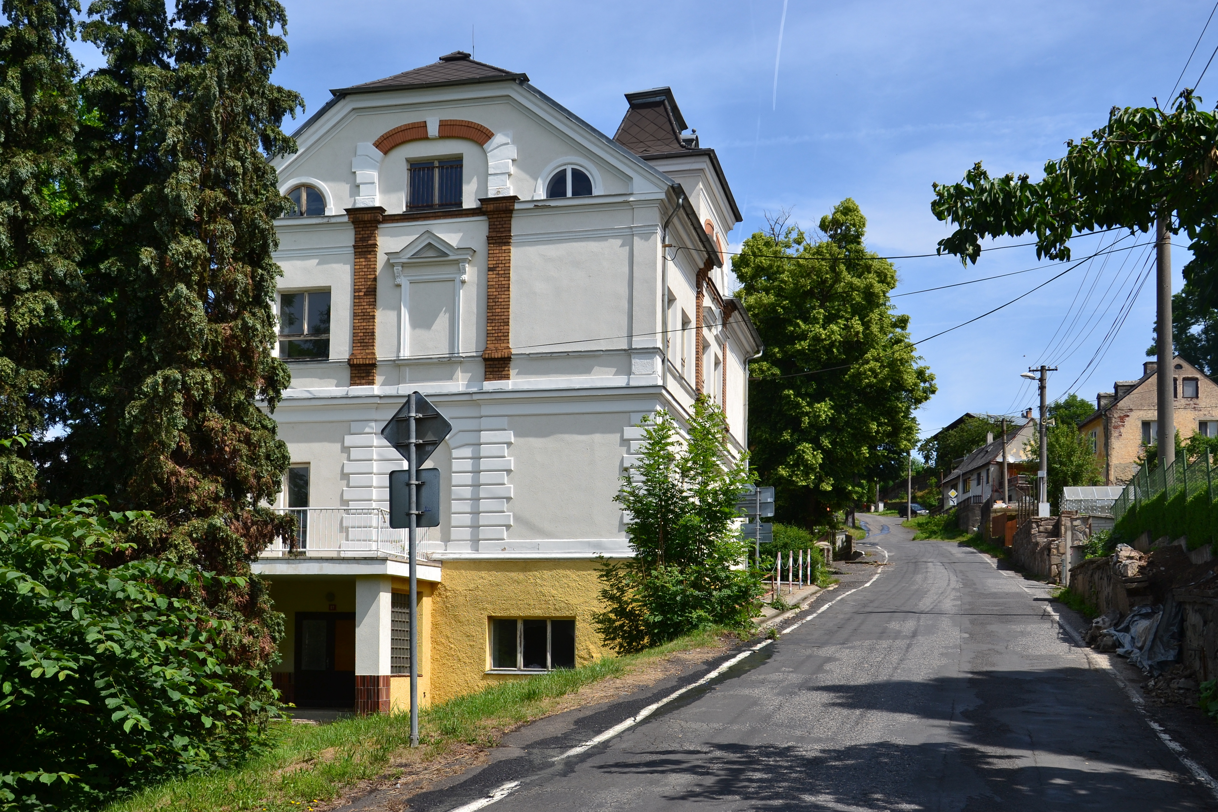 Velichov - ulice ke kostelu